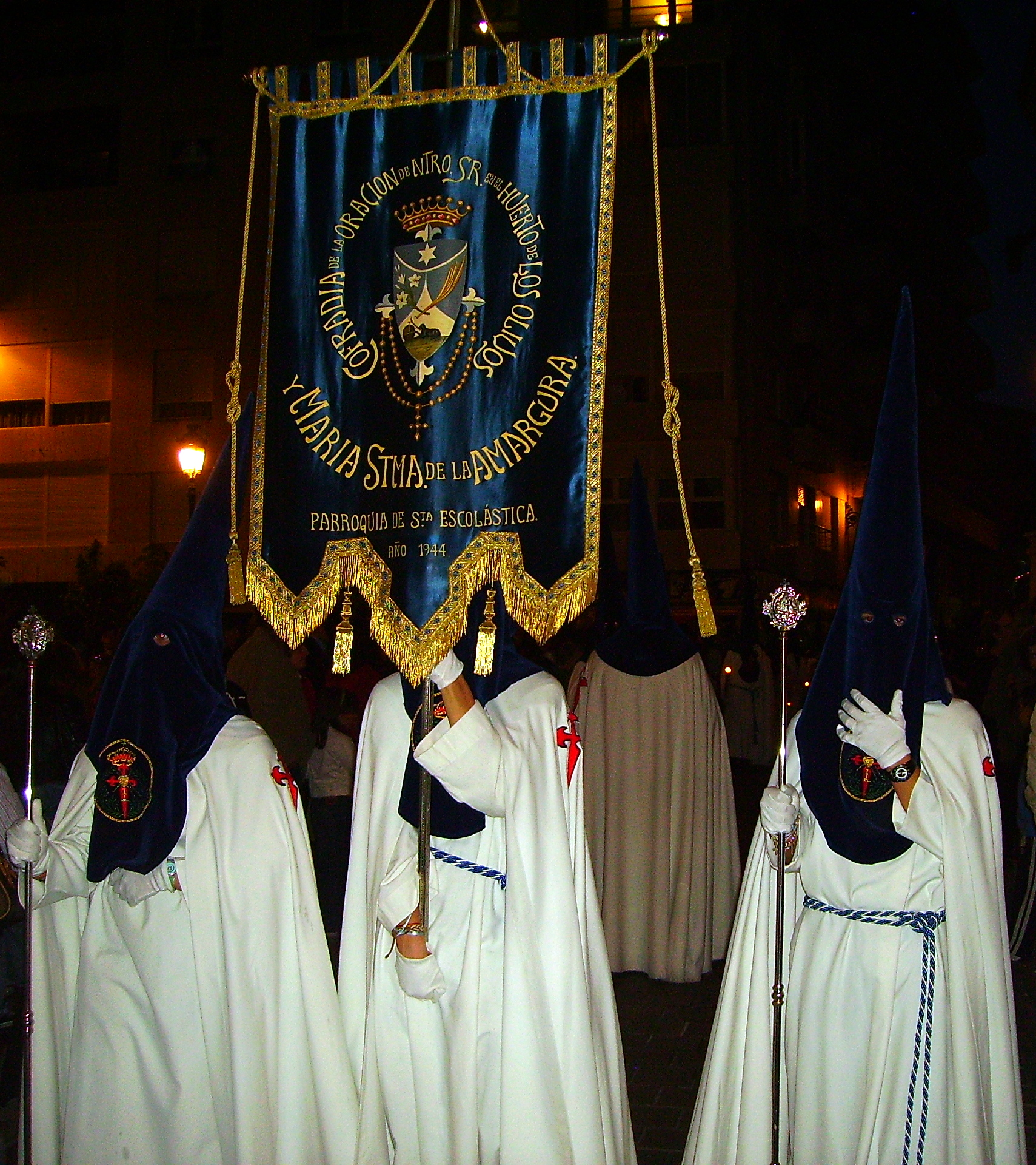 Holy Week in Granada 2009